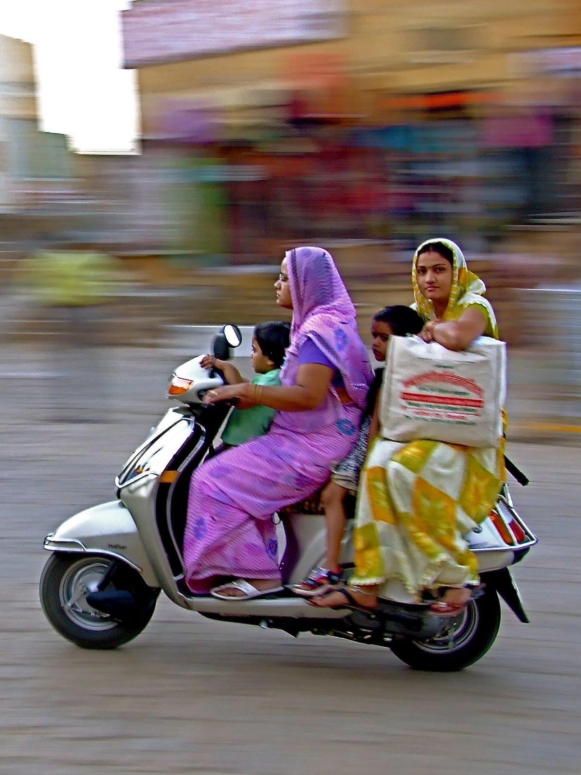 Honda Activa @ India